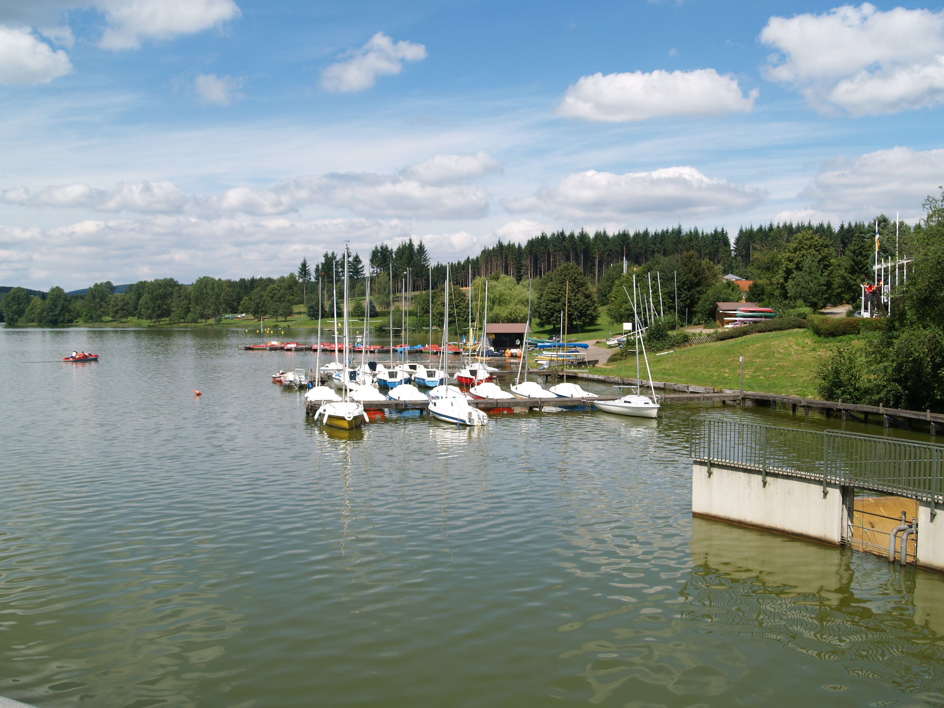 Stausee in Losheim (Saar)